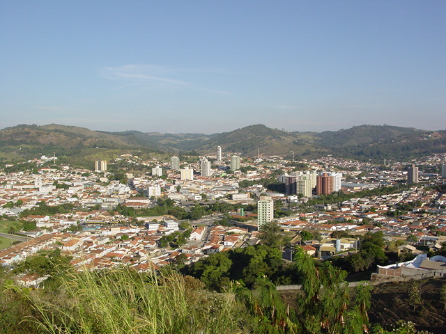 Vista da cidade de Amparo (SP), tirada no Morro do Cristo